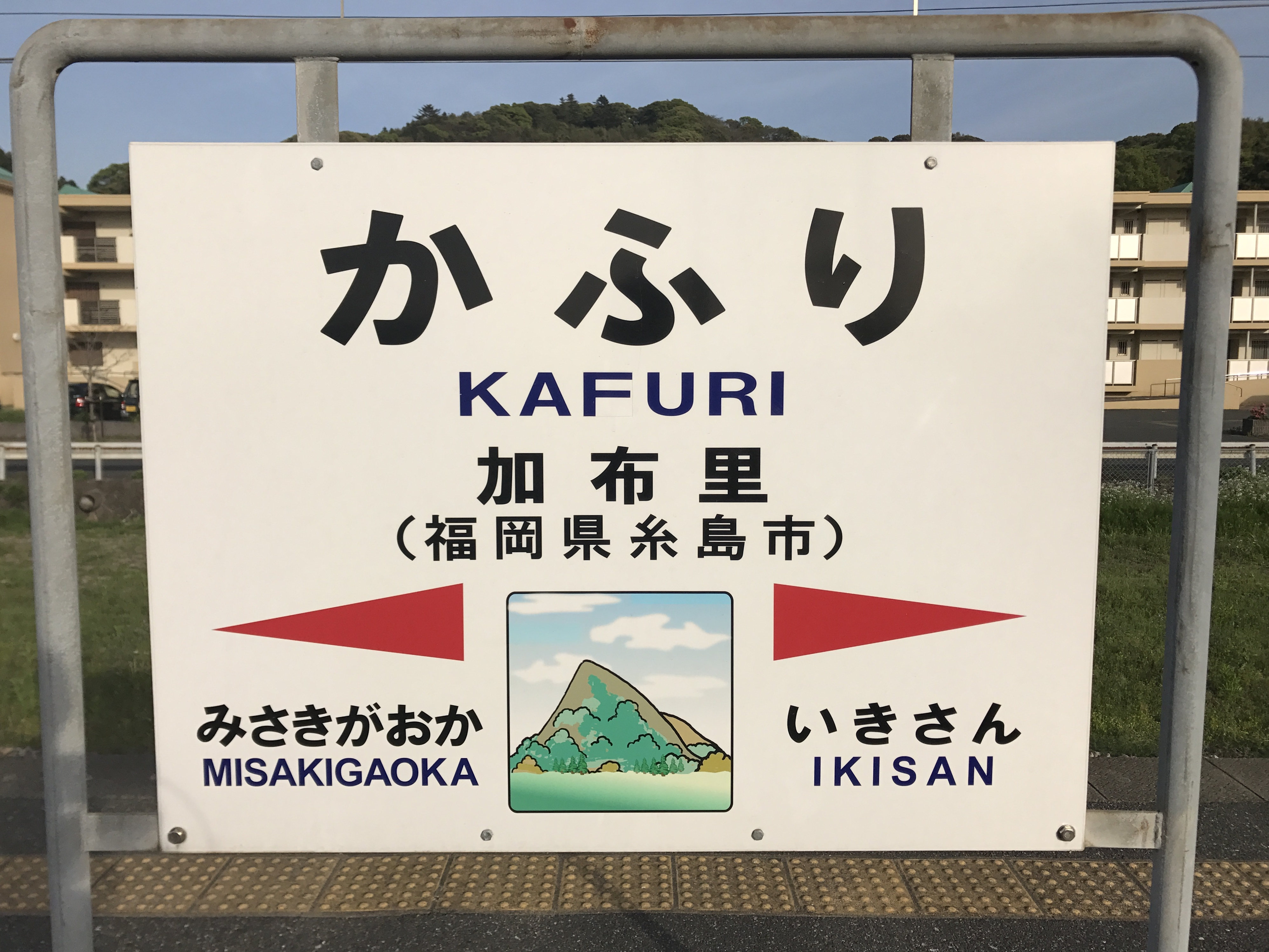 加布里駅の駅名標。イラストは可也山